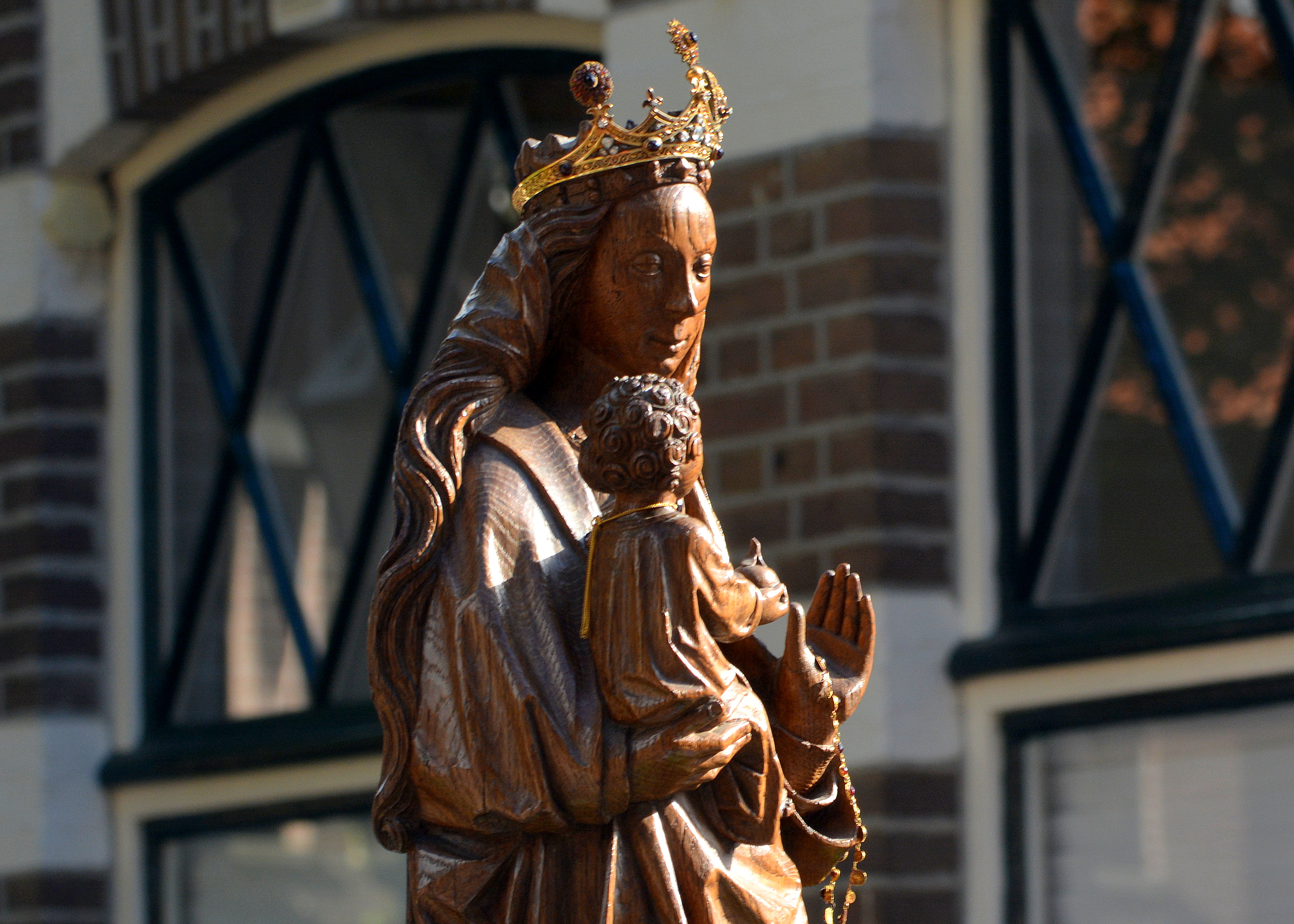 Leeuwarden, Mariaprocessie 2016